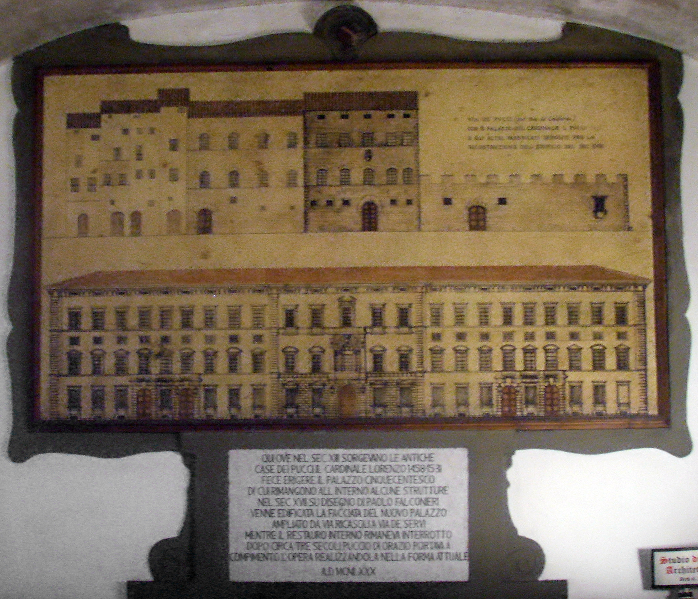 Palazzo Pucci in Florence, Italy.